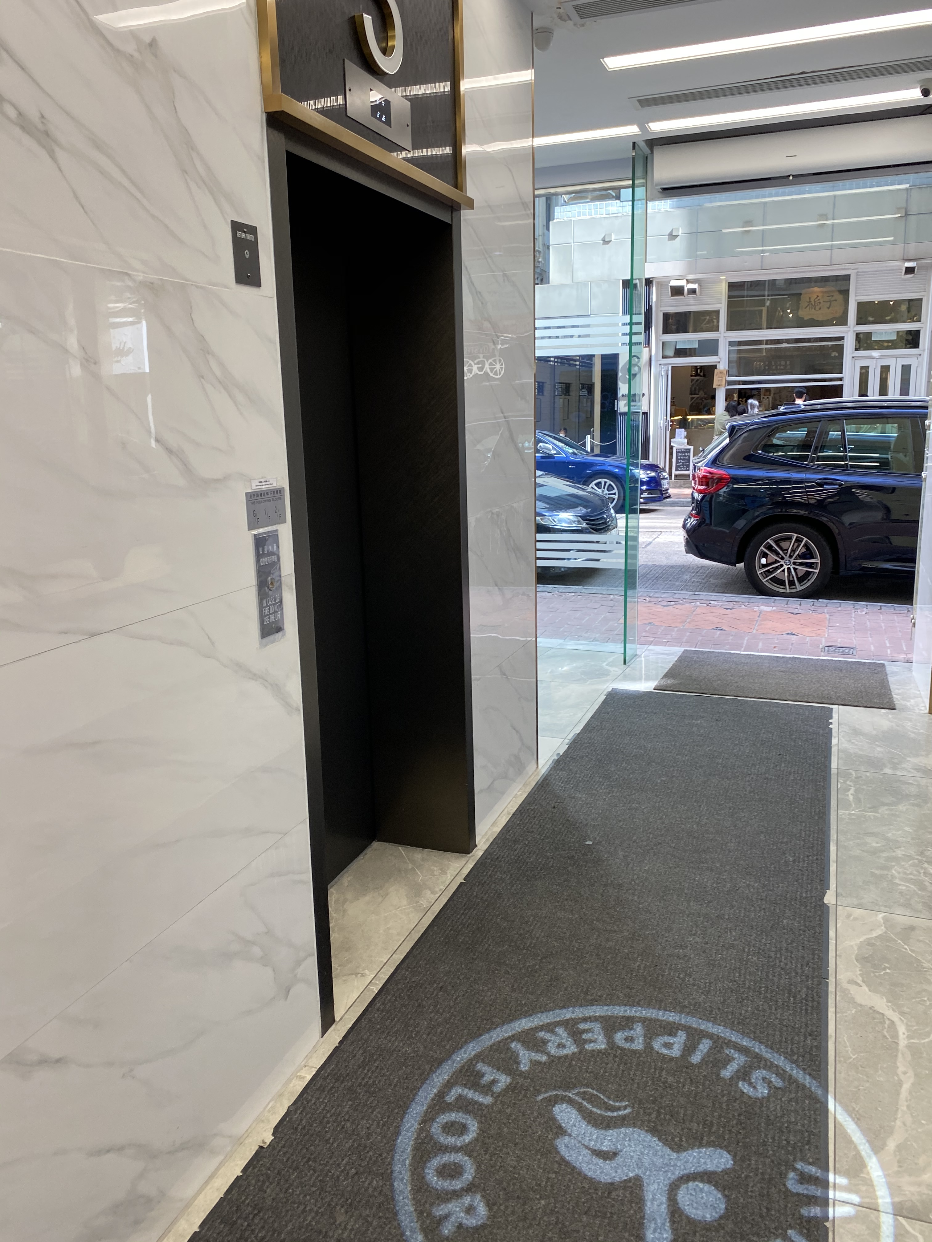 中文（香港）: 漢國佐敦中心大堂(2020年6月)